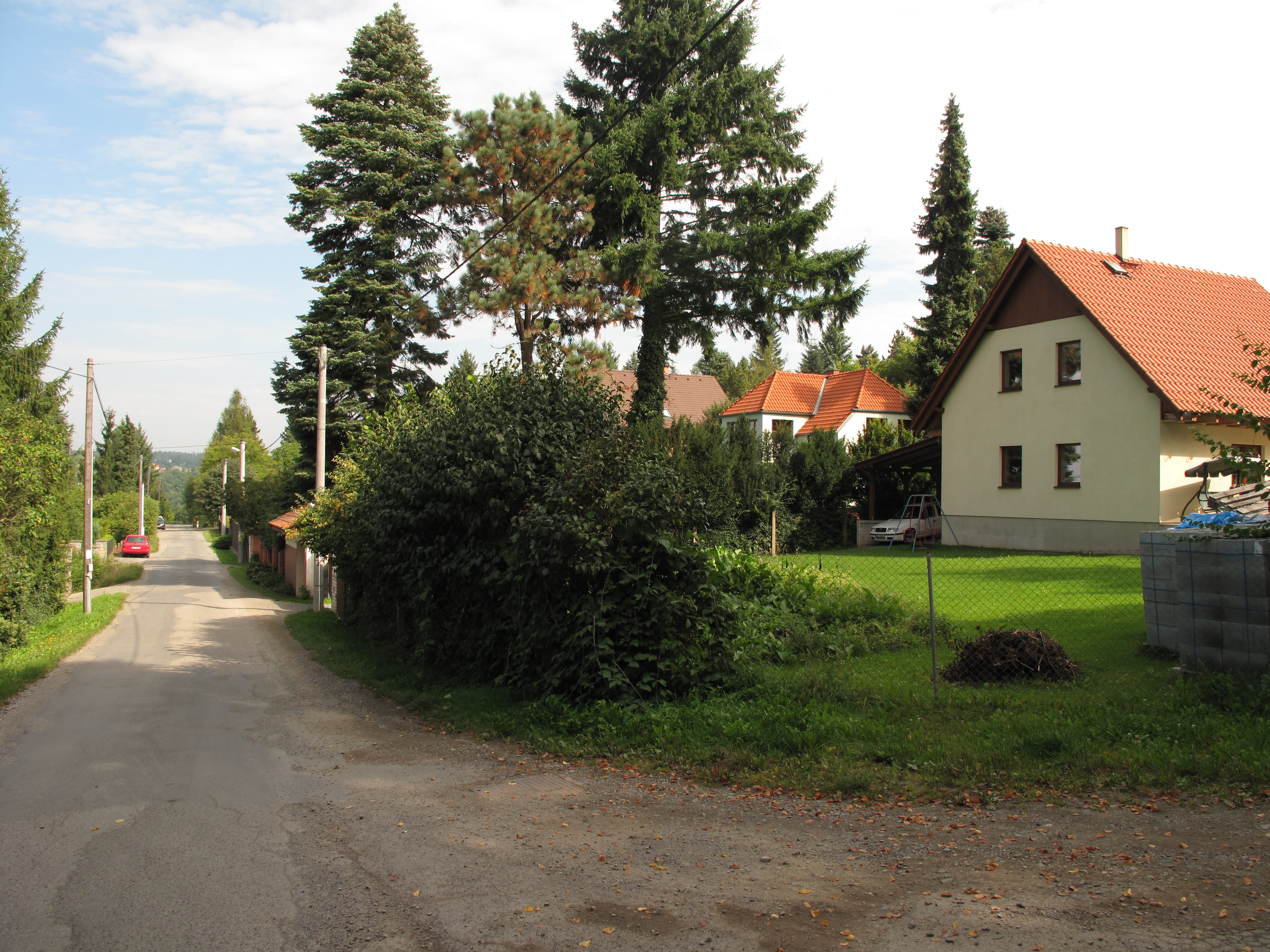 Cesta v Chlomku. Okres Praha-západ, Česká republika.